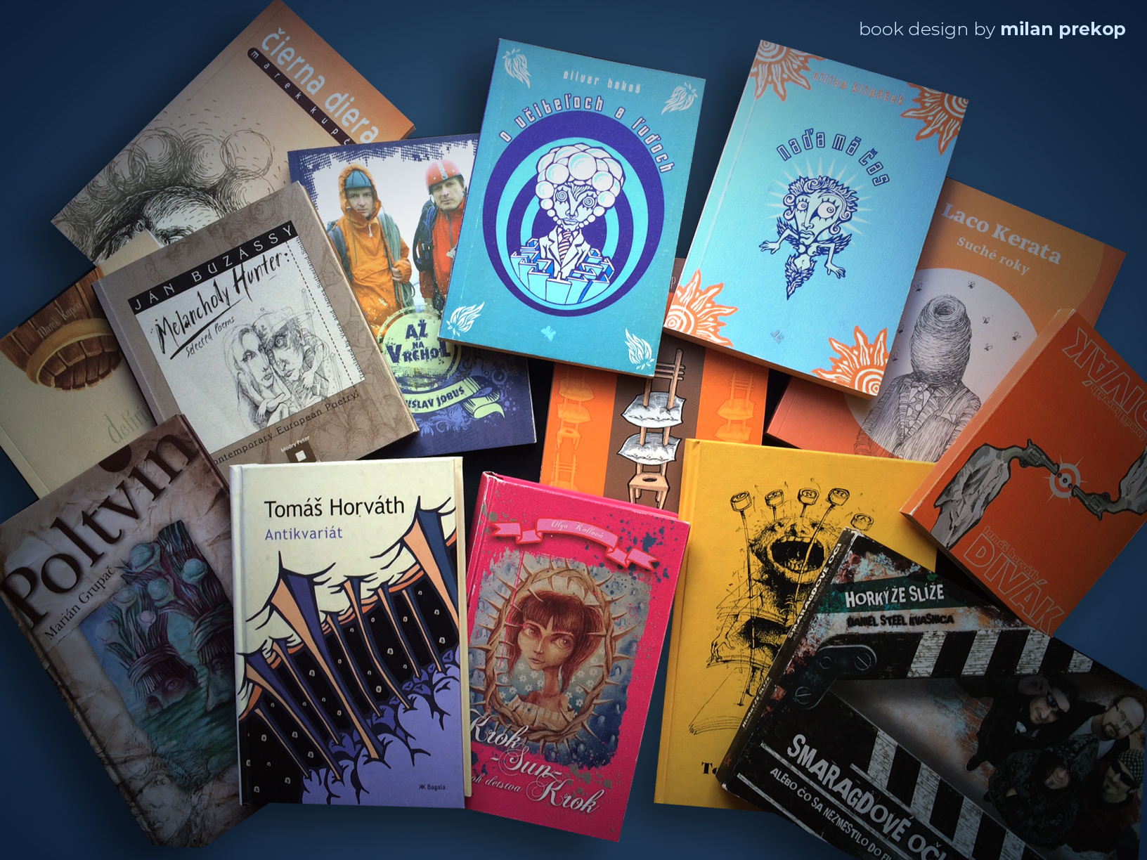 dizajn knih